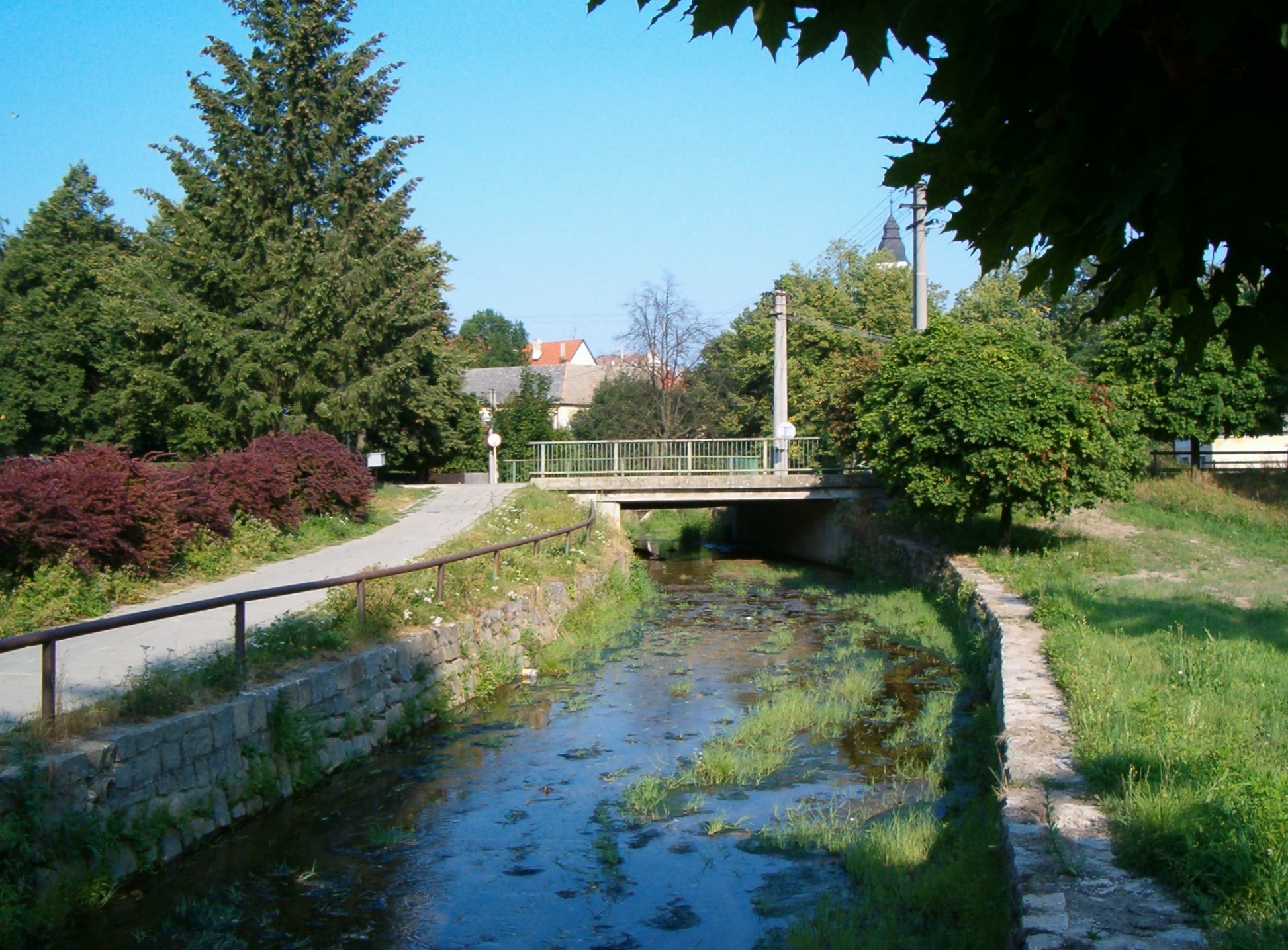 Slavonický potok při křížení se silnicí 406 ve Slavonicích